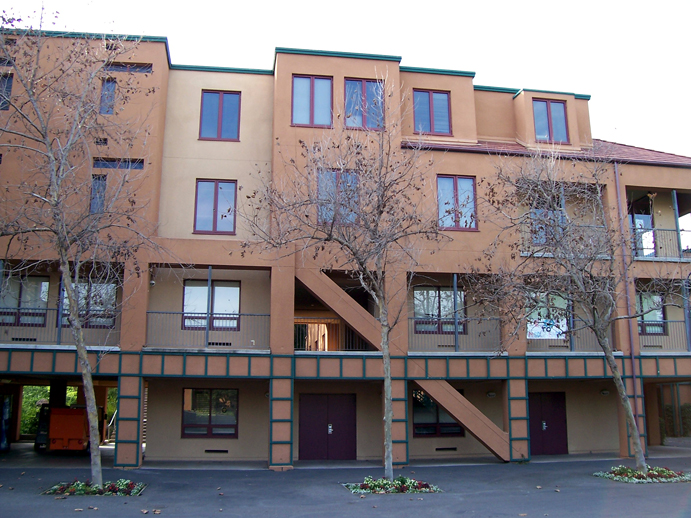 dorms